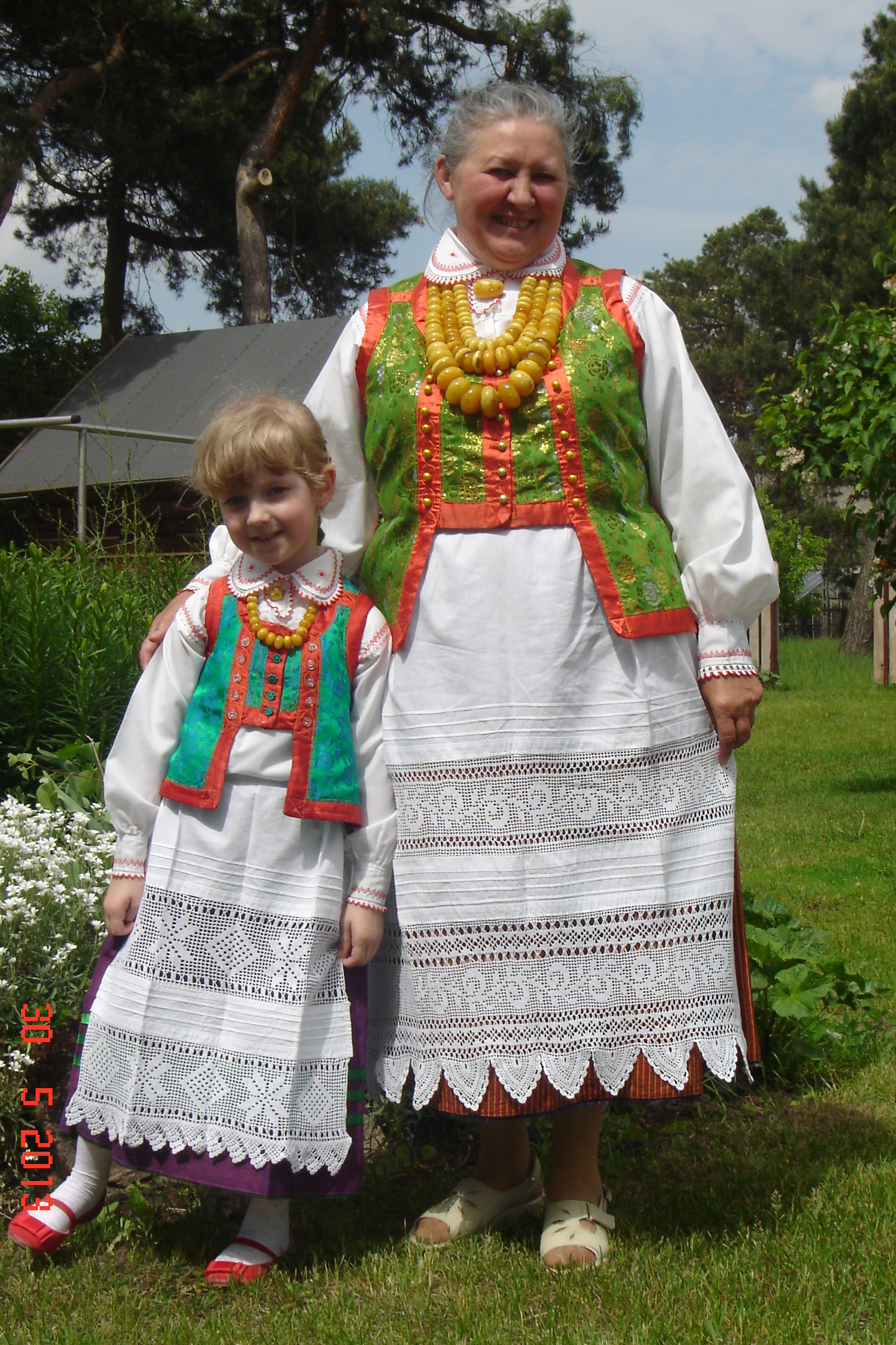 Stroje ludowe z terenu Kurpiowszczyzny. Charakterystyczny dodatek - bursztynowe korale.